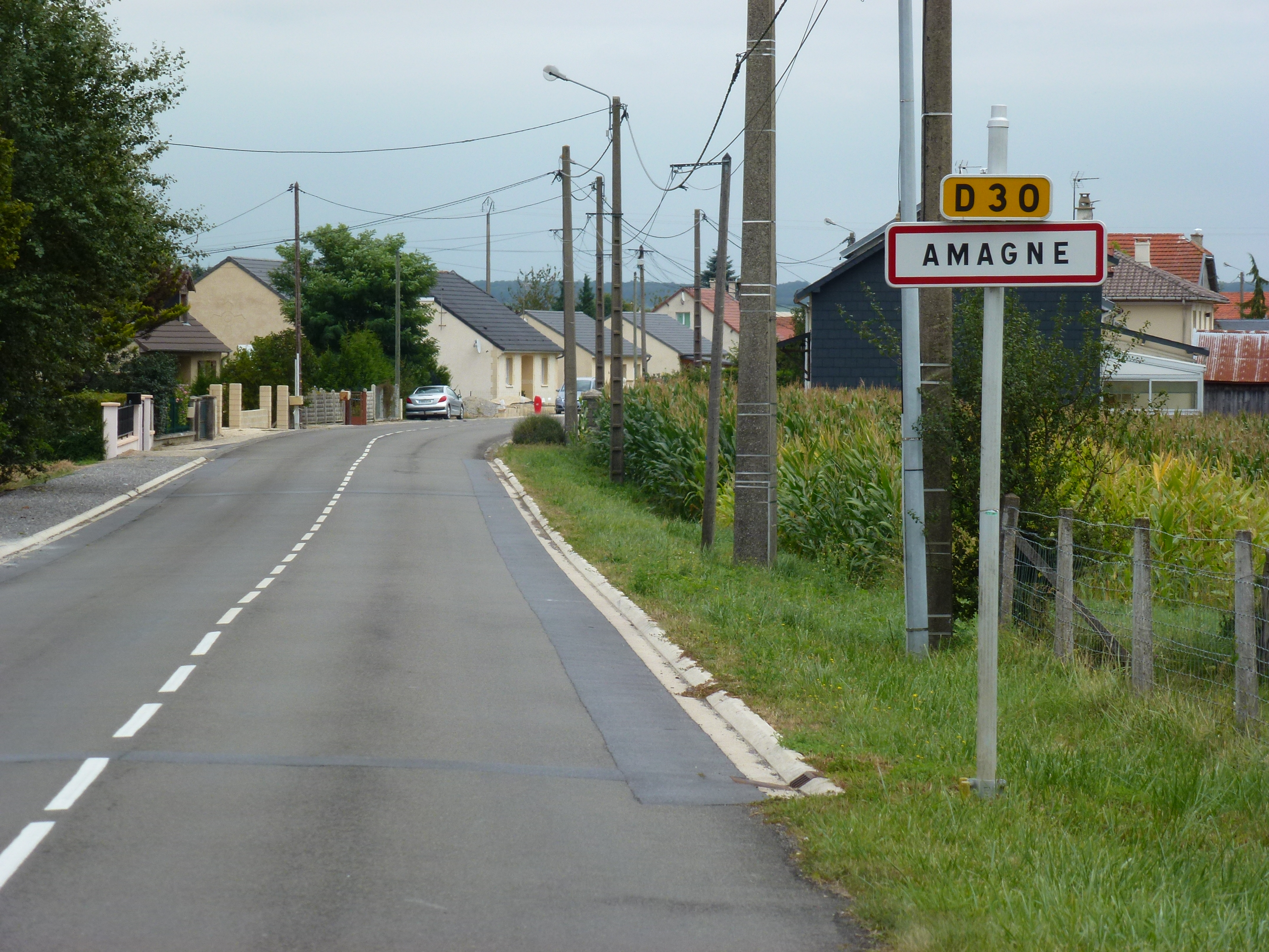 Amagne (Ardennes) city limit sign